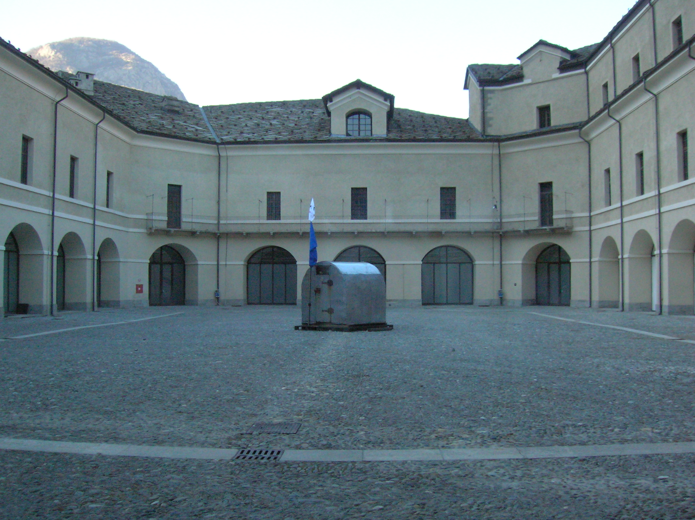 L'ex bivacco Lampugnani, sostituito nel 2011, esposto al Forte di Bard, Bard, Valle d'Aosta, Italia.